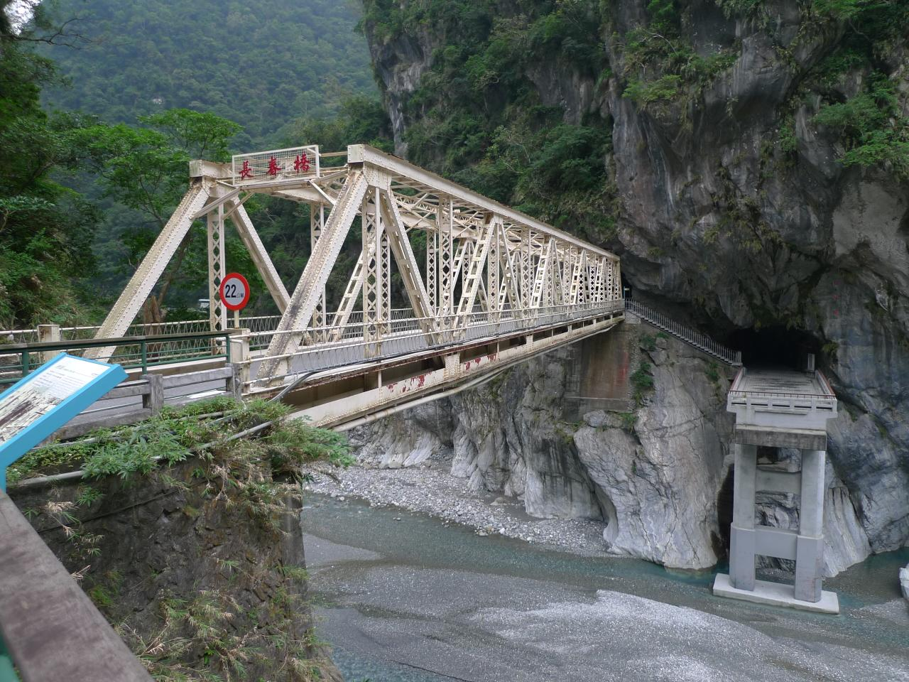 臺灣花蓮縣立霧溪上的長春橋